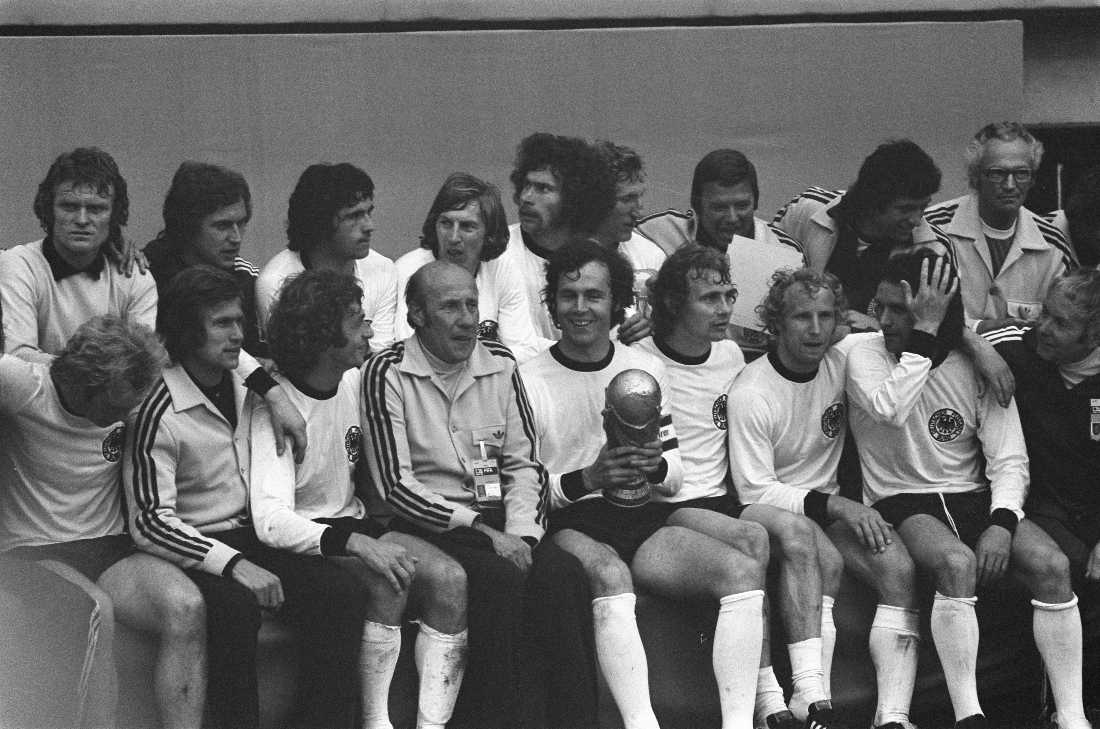 Collectie / Archief : Fotocollectie Anefo Reportage / Serie : [ onbekend ] Beschrijving : Finale wereldkampioenschap voetbal 1974 in Munchen, West Duitsland tegen Nederland 2-1; Duitse elftal met wereldbeker Datum : 7 juli 1974 Locatie : München, Nederland, West-Duitsland Trefwoorden : elftallen, finales, sport, voetbal, wereldkampioenschappen Fotograaf : Verhoeff, Bert / Anefo Auteursrechthebbende : Nationaal Archief Materiaalsoort : Negatief (zwart/wit) Nummer archiefinventaris : bekijk toegang 2.24.01.05 Bestanddeelnummer : 927-3098